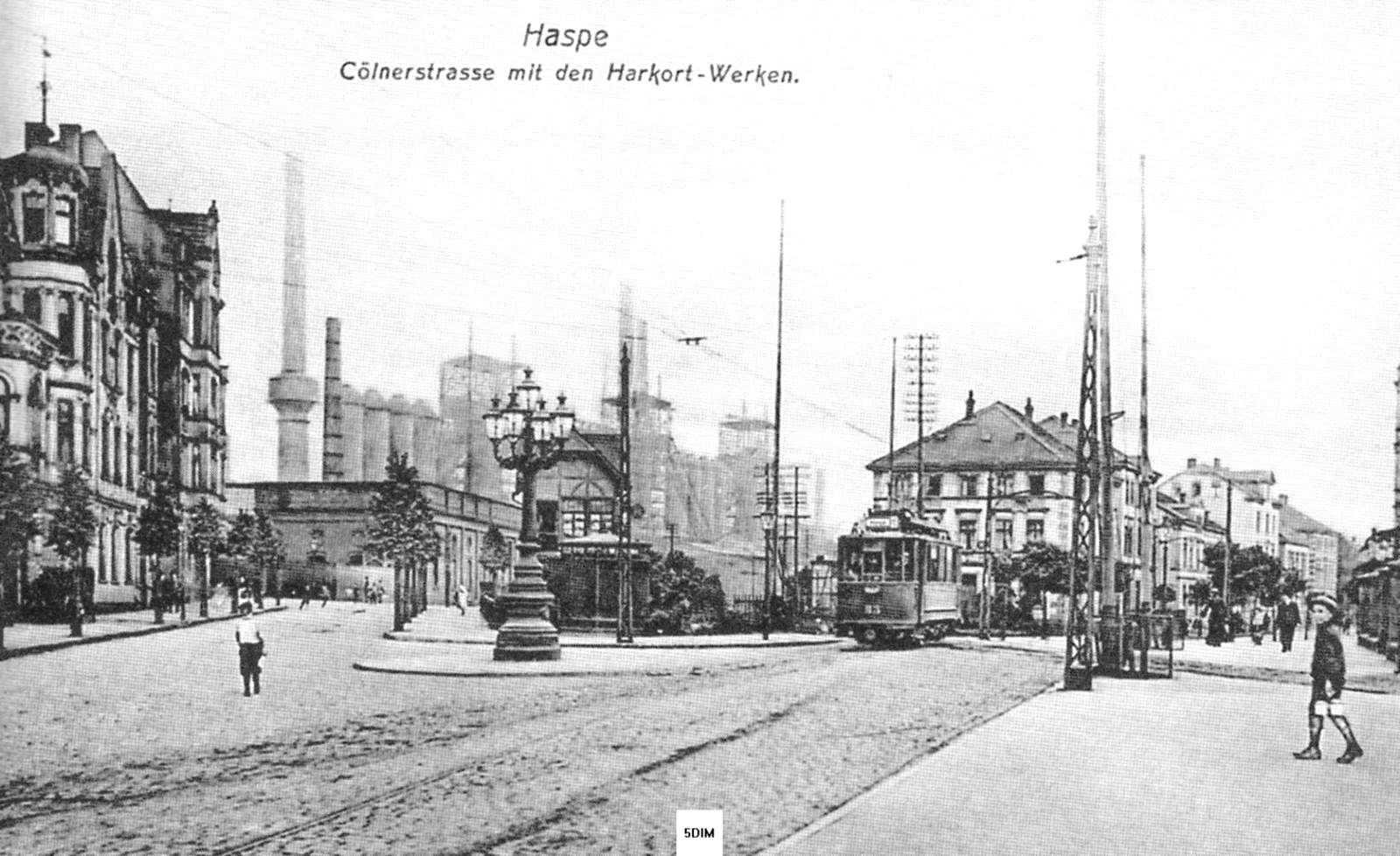 Bahnhof Niederhaspe und Hasper Hütte